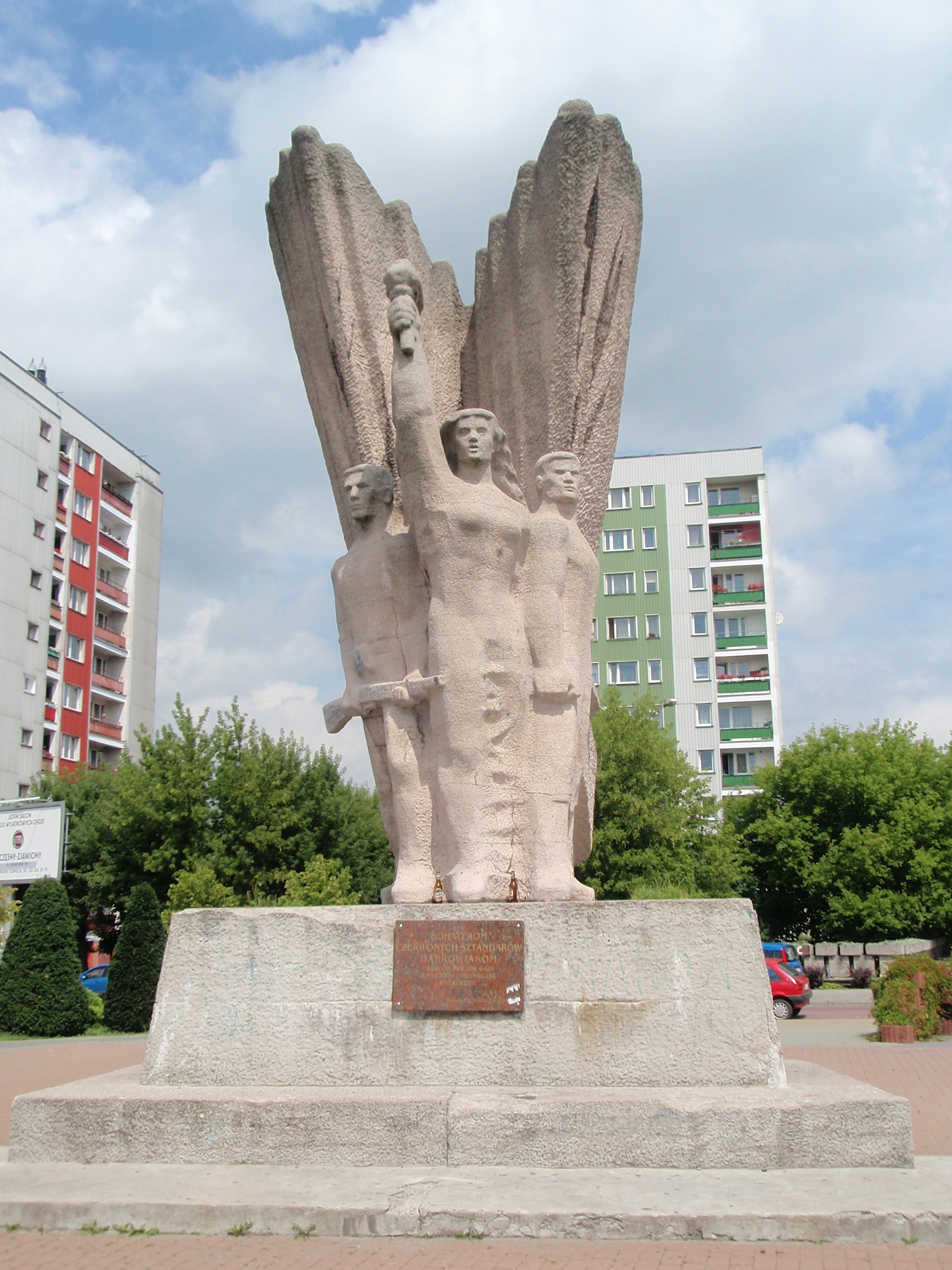 Pomnik Bohaterów Czerwonych Sztandarów, Dąbrowa Górnicza, Polska